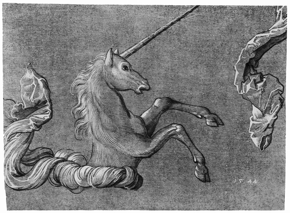 Künstler: Baldung Grien, Hans Entstehungsjahr: 1544 Maße: 26,5 × 20 cm Technik: Pinsel, weiß gehöht, auf blaugrau grundiertem Papier Aufbewahrungsort: London Sammlung: British Museum, Department of Prints and Drawings Epoche: Renaissance Land: Deutschland Kommentar: Studie zu Baldungs Wappen auf dem Holzschnitt »Behexter Stallknecht